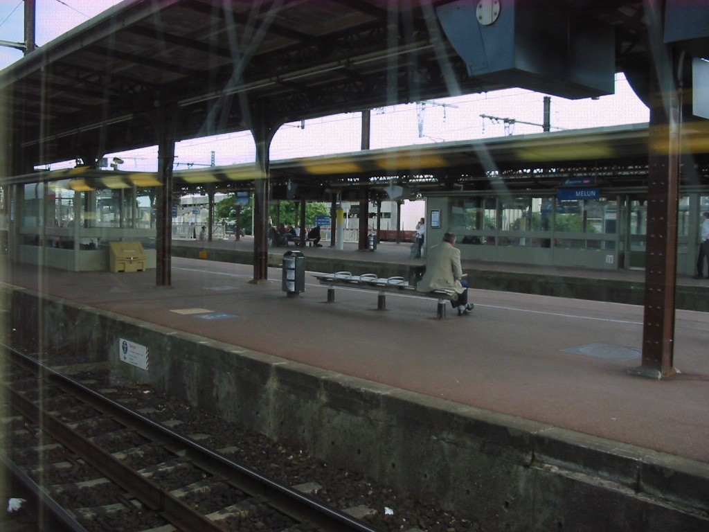 Gare de Melun, France